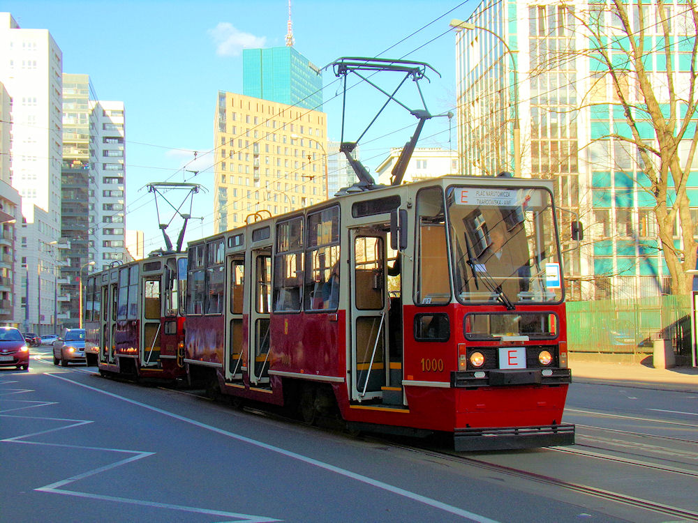 Skład zabytkowych wagonów 105N w Warszawie, 2017